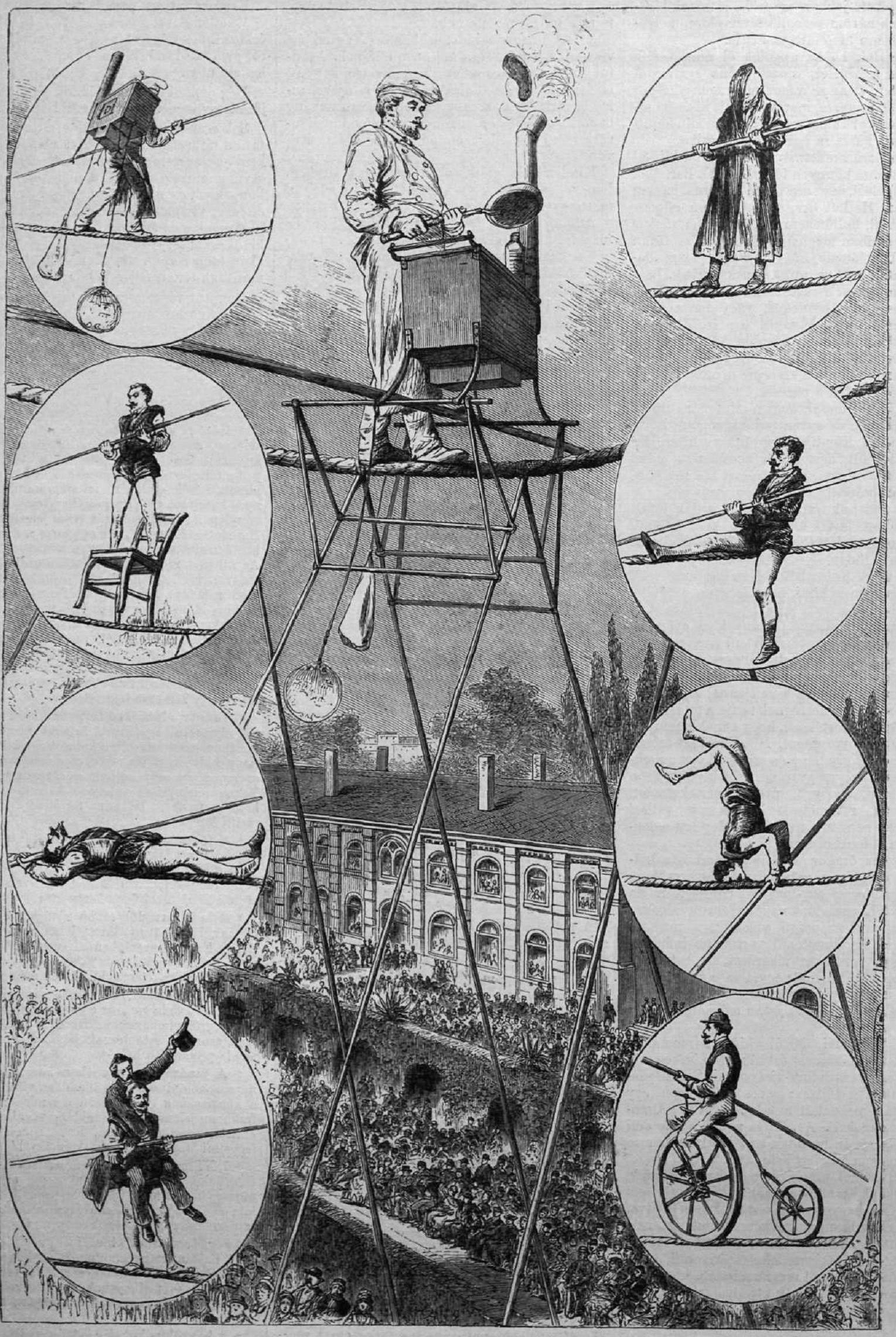 Charles Blondin mutatványai